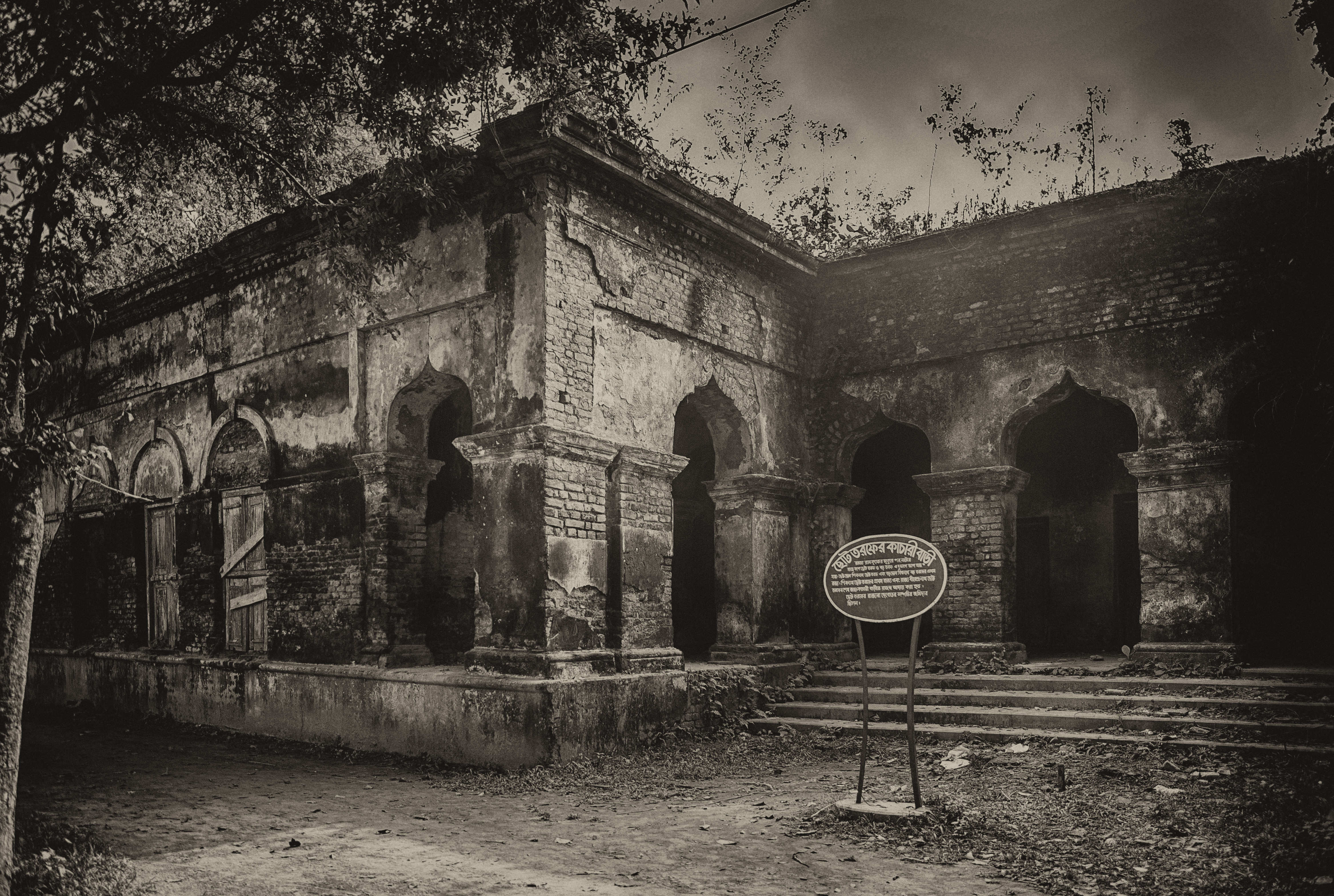 নাটোর রাজবাড়ী